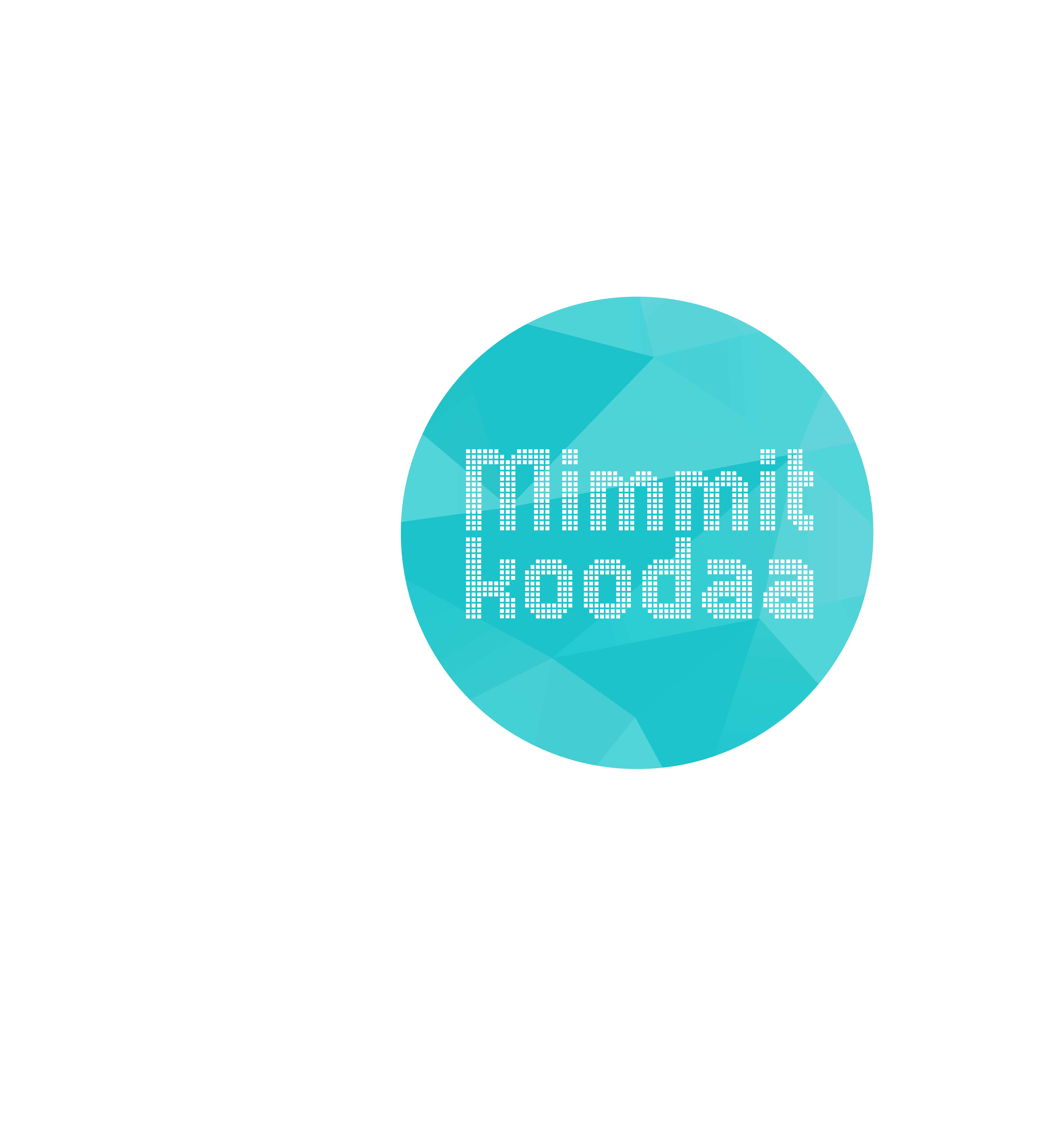 Mimmit Koodaa -logo.